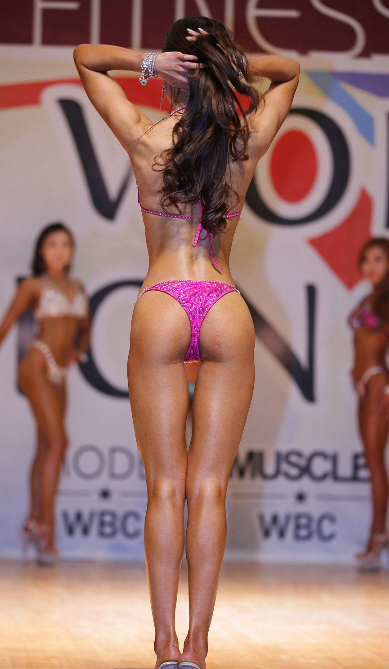 2015 WBC 피트니스 오픈 월드 챔피언쉽 미즈비키니종목 2라운드 비키니웨어